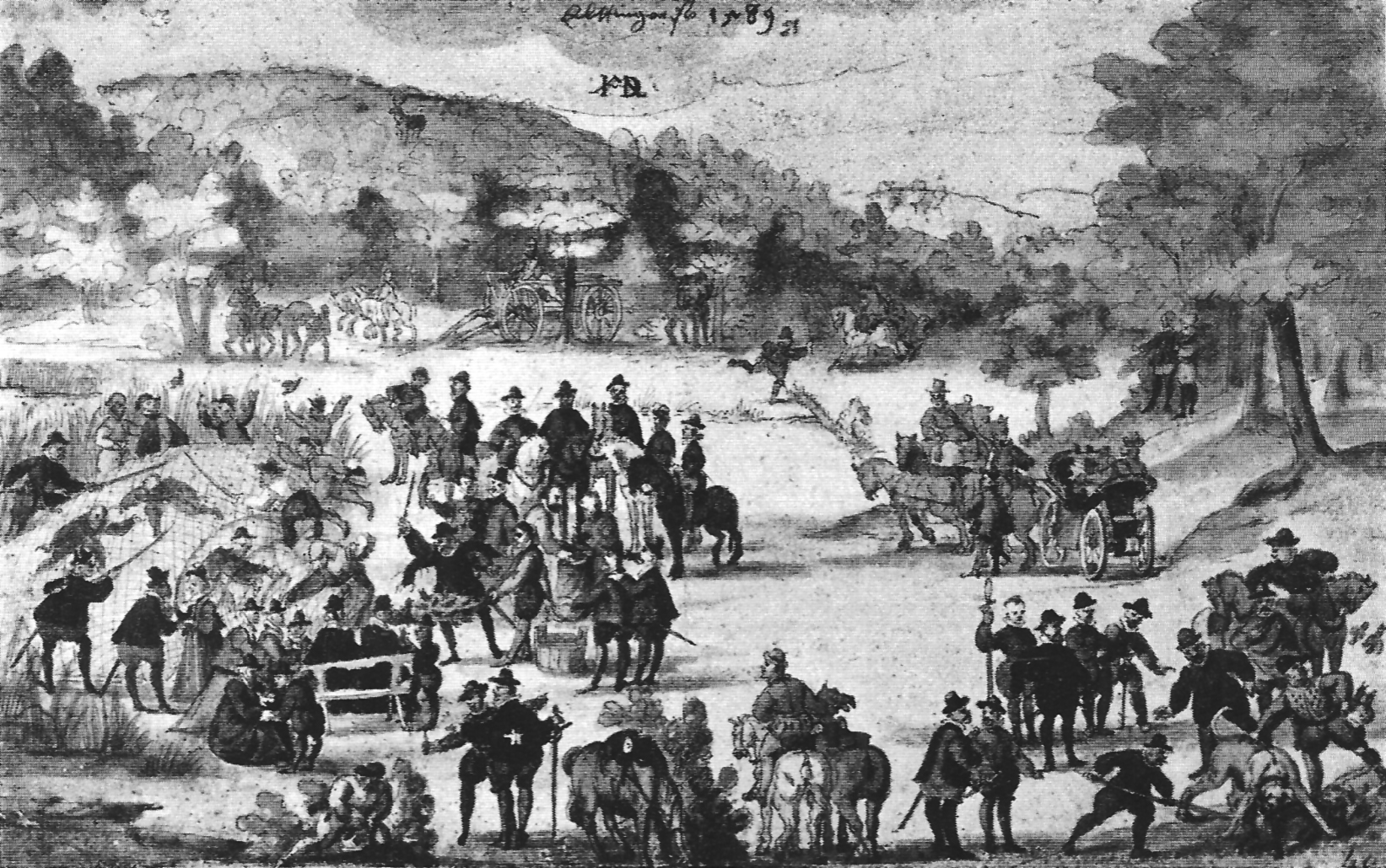 Vogeljagd im Leonberger Forst (Federzeichnung braun, farbig laviert, 20,4×32,6 cm, beschriftet „Eltingen Ao 1589“ und „IHDM“ (d. h. wahrscheinlich: Johann Dorn Maler); University College, London)